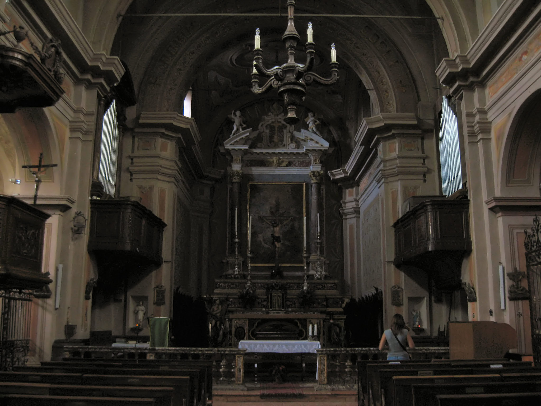 Calestano (PR), chiesa principale